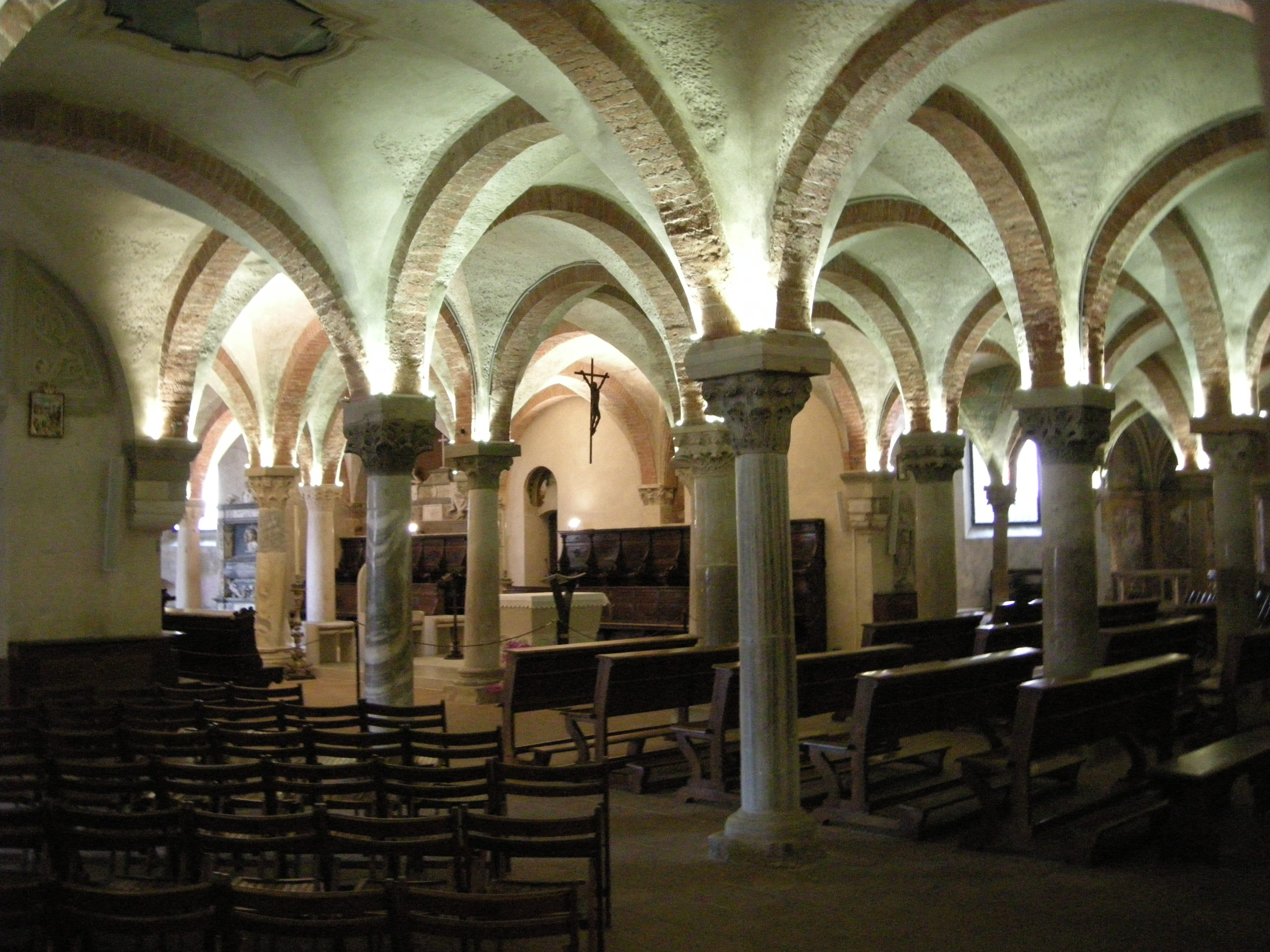 Duomo di parma, cripta